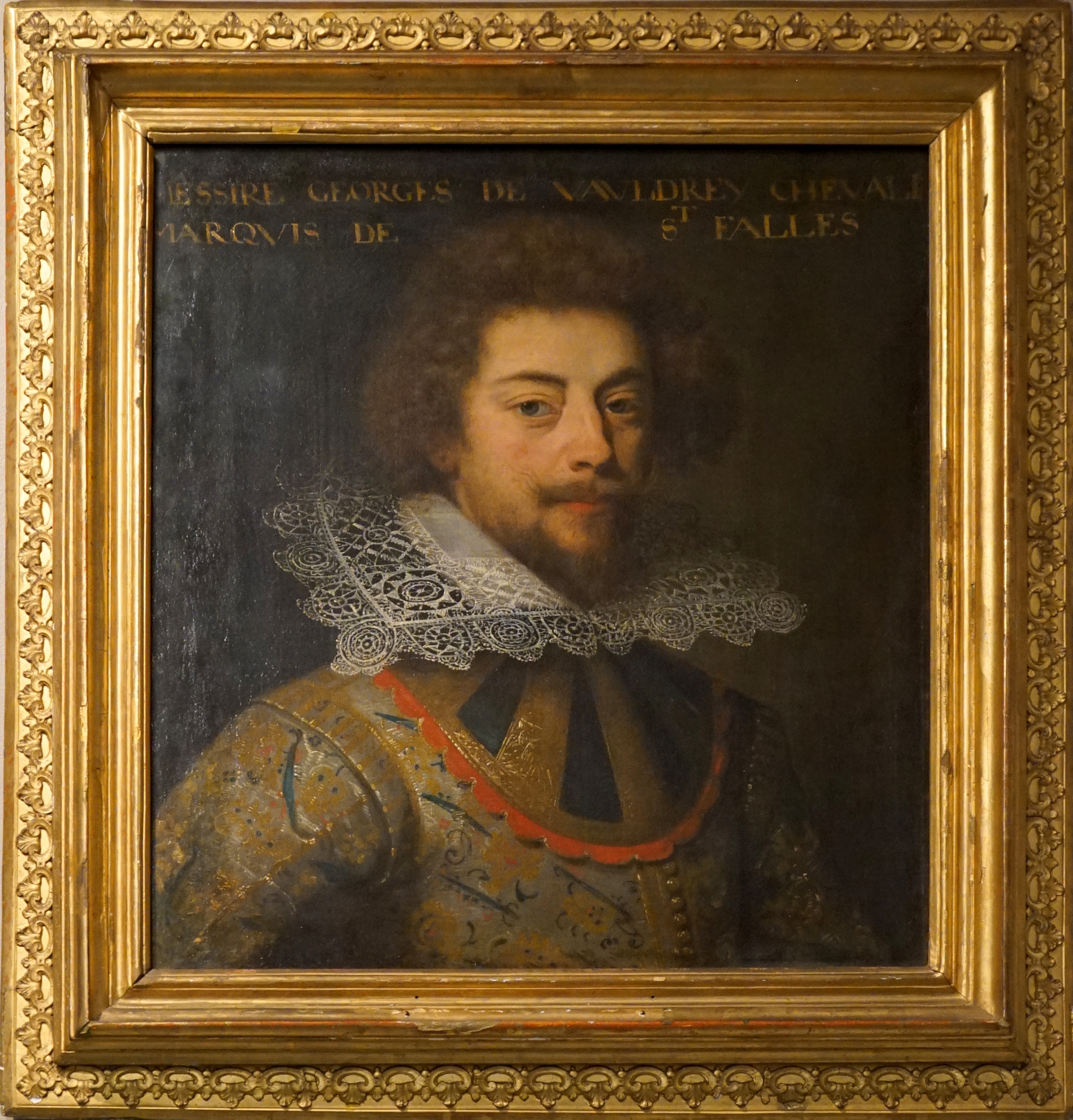 présenté au musée de Troyes.